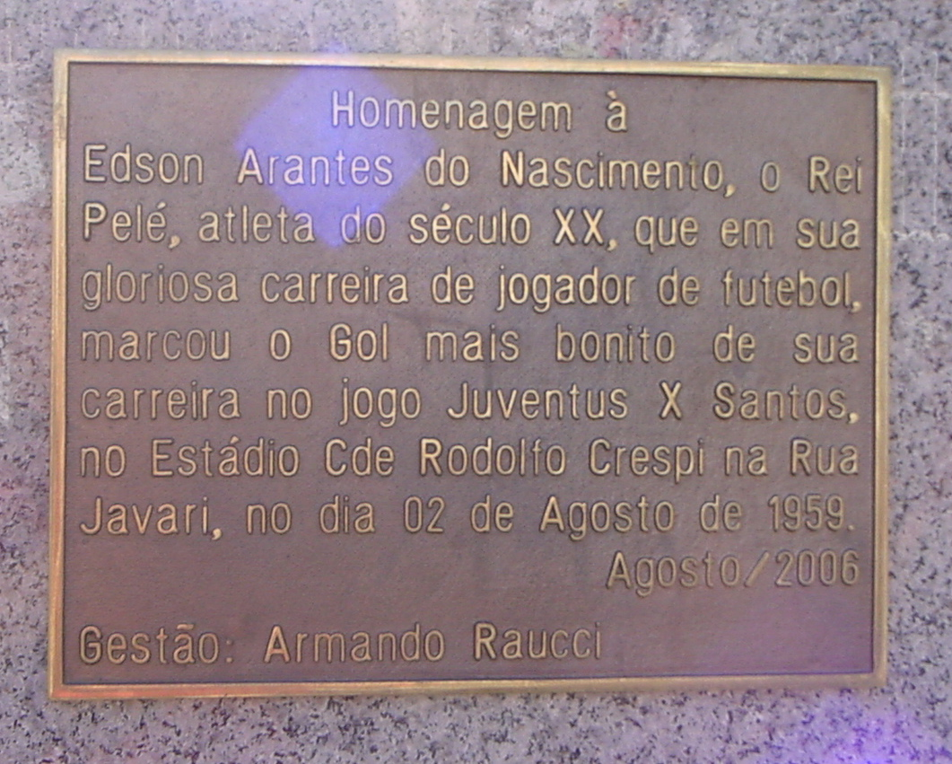 Plaque under Pele Bust on Rua Javari